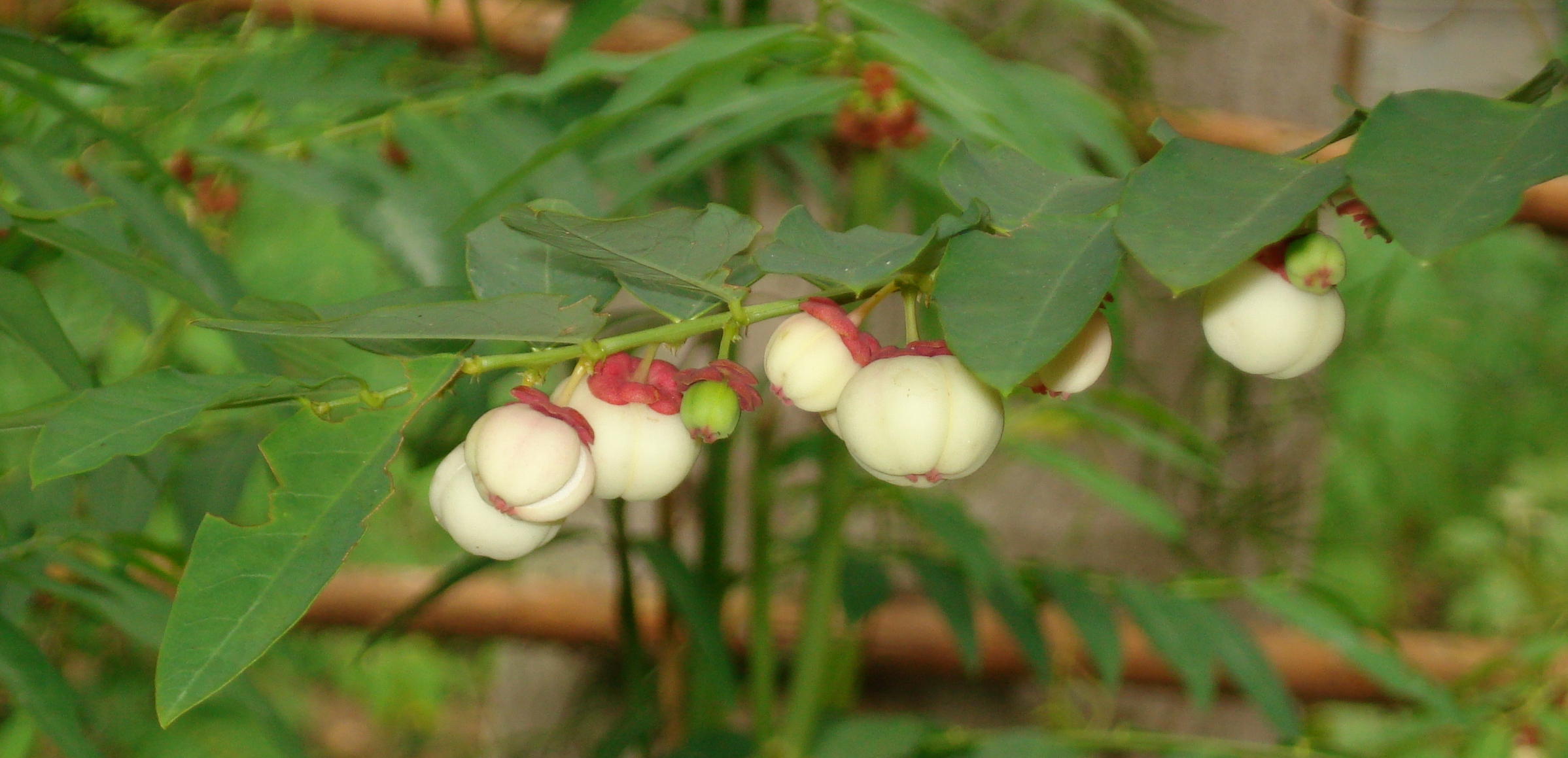 සිංහල: ජපං බටු කොල සහ ගෙඩි